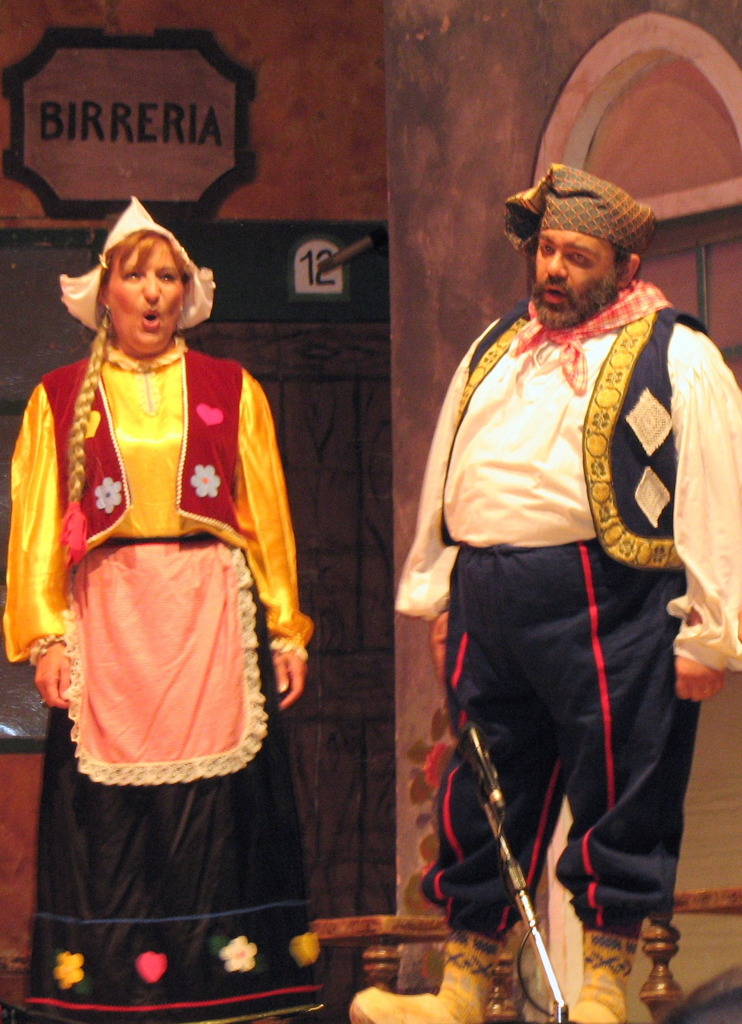 Genova - porto antico Compagnia Alfa Folies - Il paese dei campanelli - Nella foto: Claudio Bertoni e Rosalba Cuni